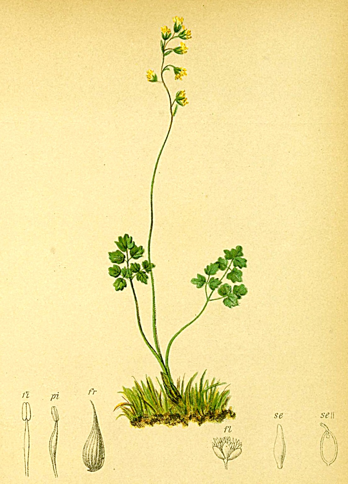 Thalictrum alpinum